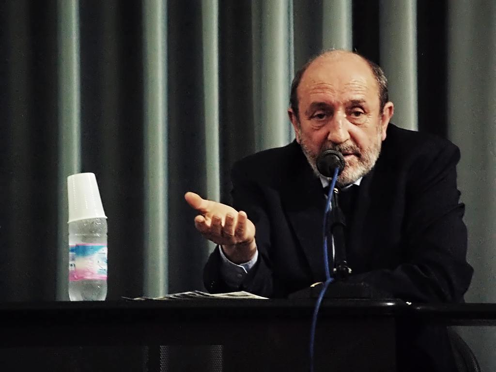 Il prof. Umberto Galimberti durante una conferenza